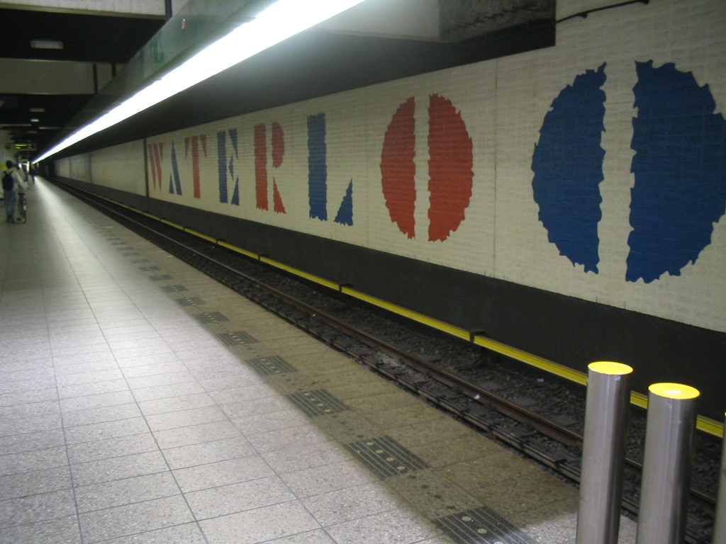 Metrostation waterlooplein (Amsterdam, Netherlands), july 2005